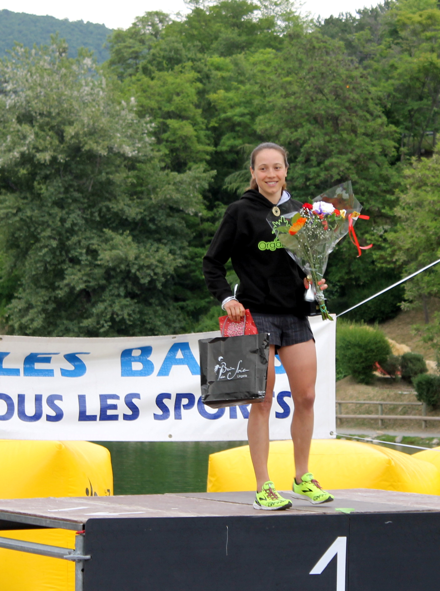 Morgane Riou M Dignes les Bains (France)